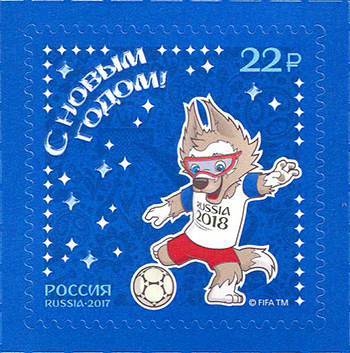 Почтовая марка России, выпущенная 1 декабря 2017 года, из серии «C Новым годом! Талисман Чемпионата мира по футболу FIFA 2018 в России™». На марке изображён Забивака, бьющий по мячу. Дизайнер — О. Савина. Номер по каталогу — 2294.